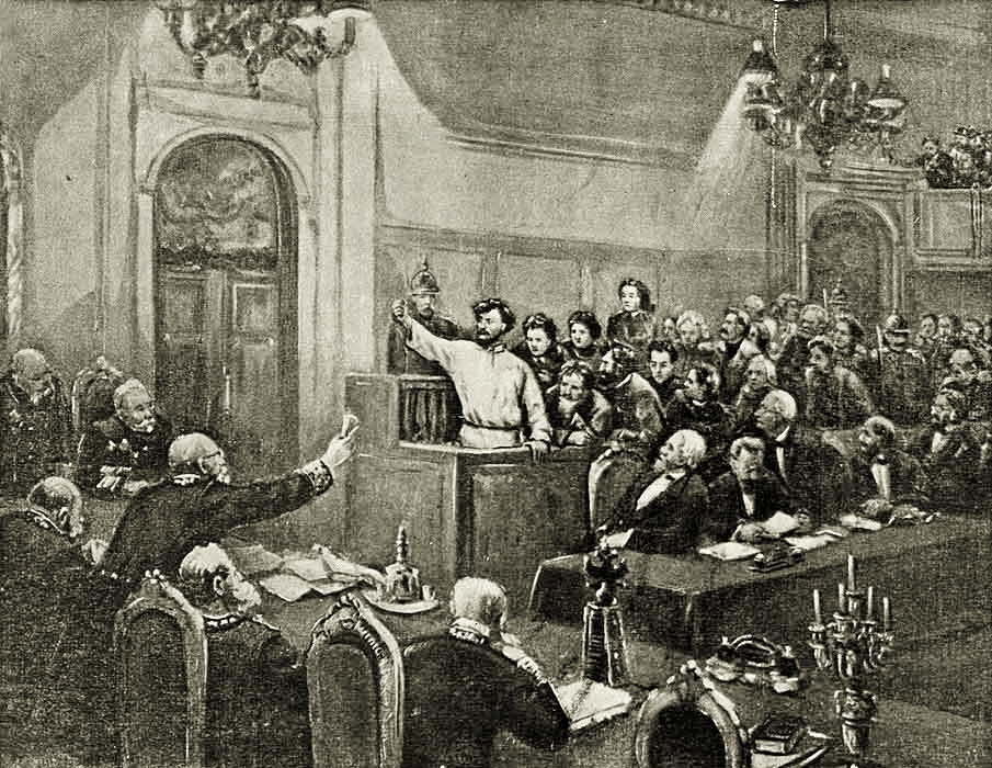 Petr Alekseev il 9 marzo 1877 nel corso del processo ai 50